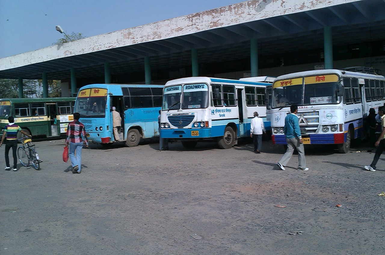 jhunjhunu bus stand